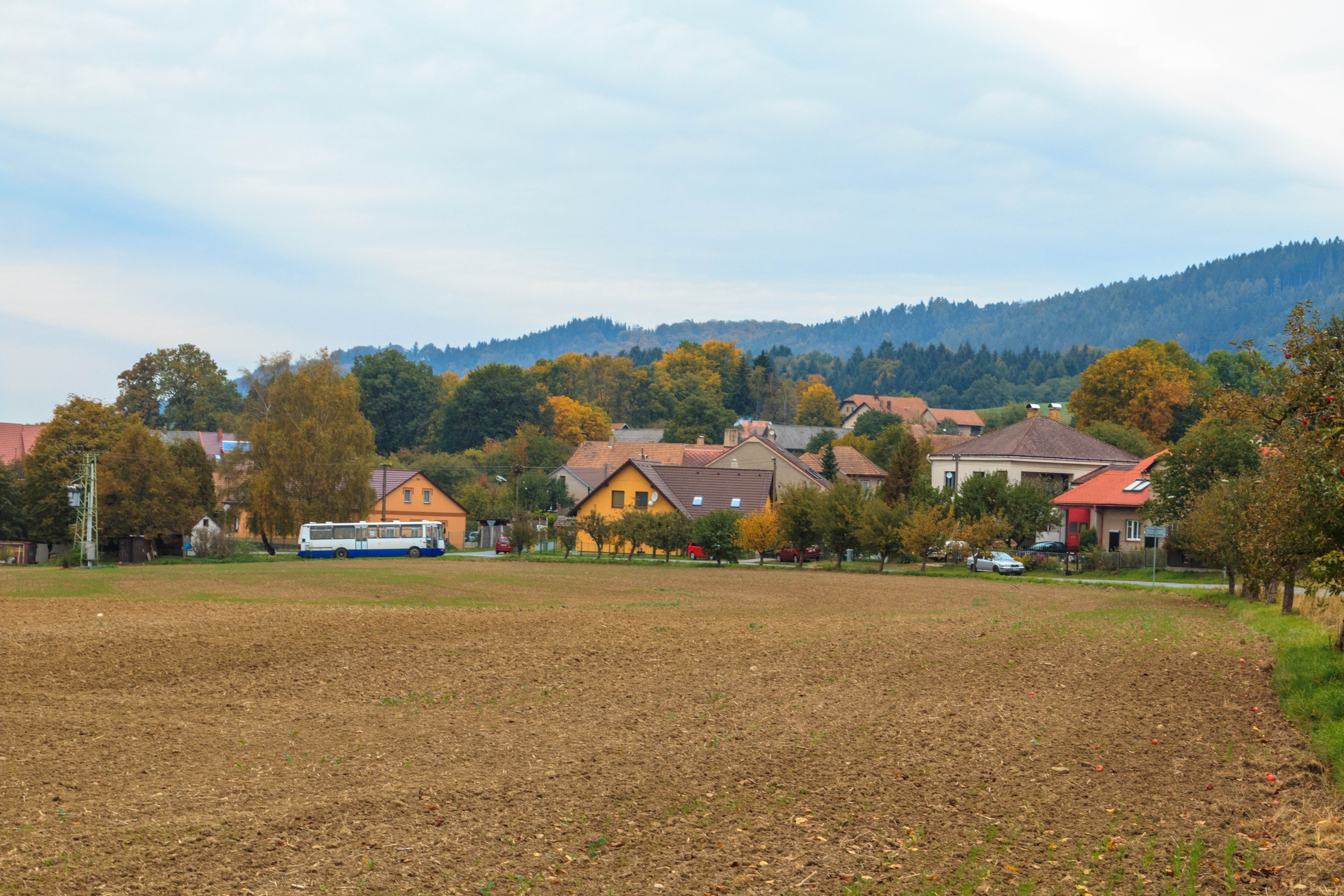 Pohled na Čečkovice